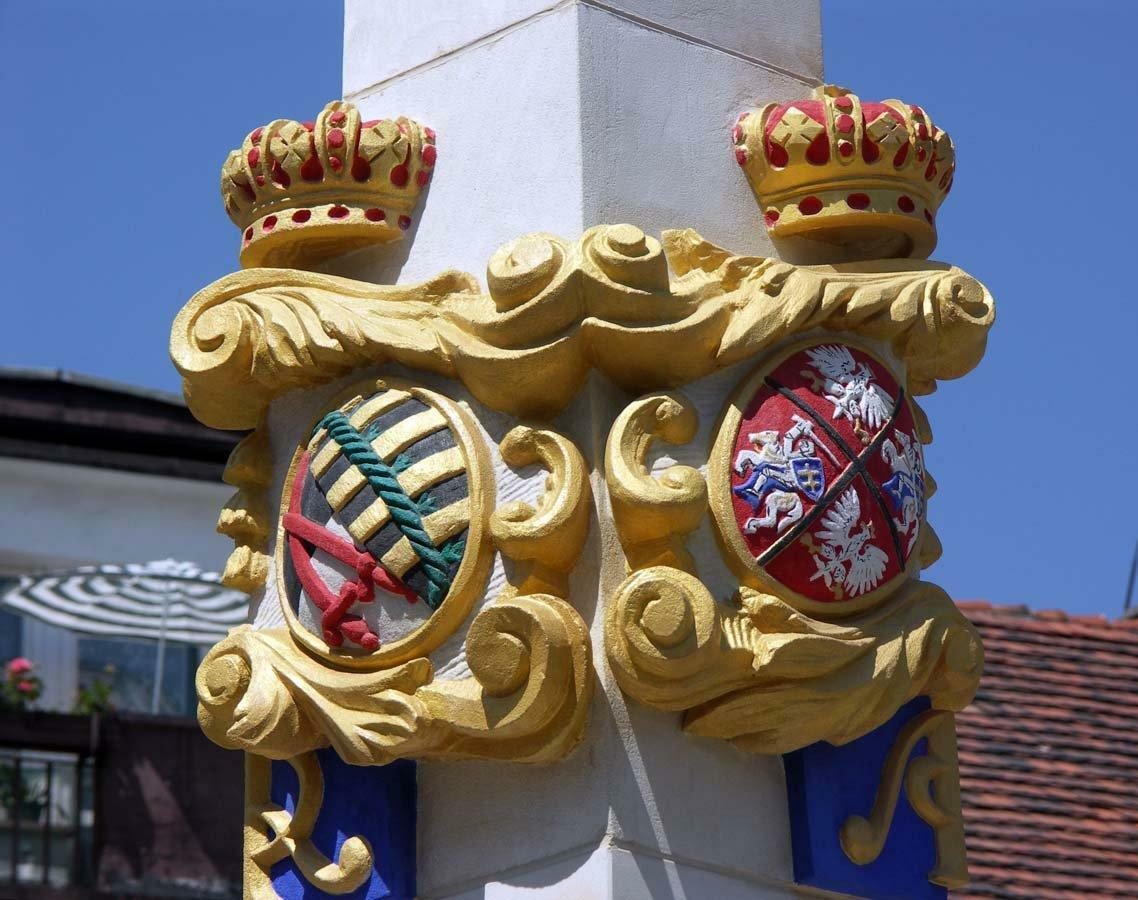 Herby osadzone wokół słupa w jego górnej części.